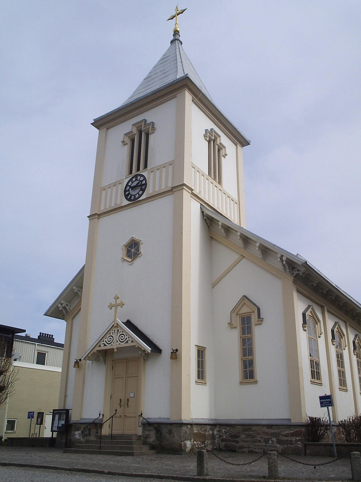 Kungsbacka kyrka, vid Stortorget.